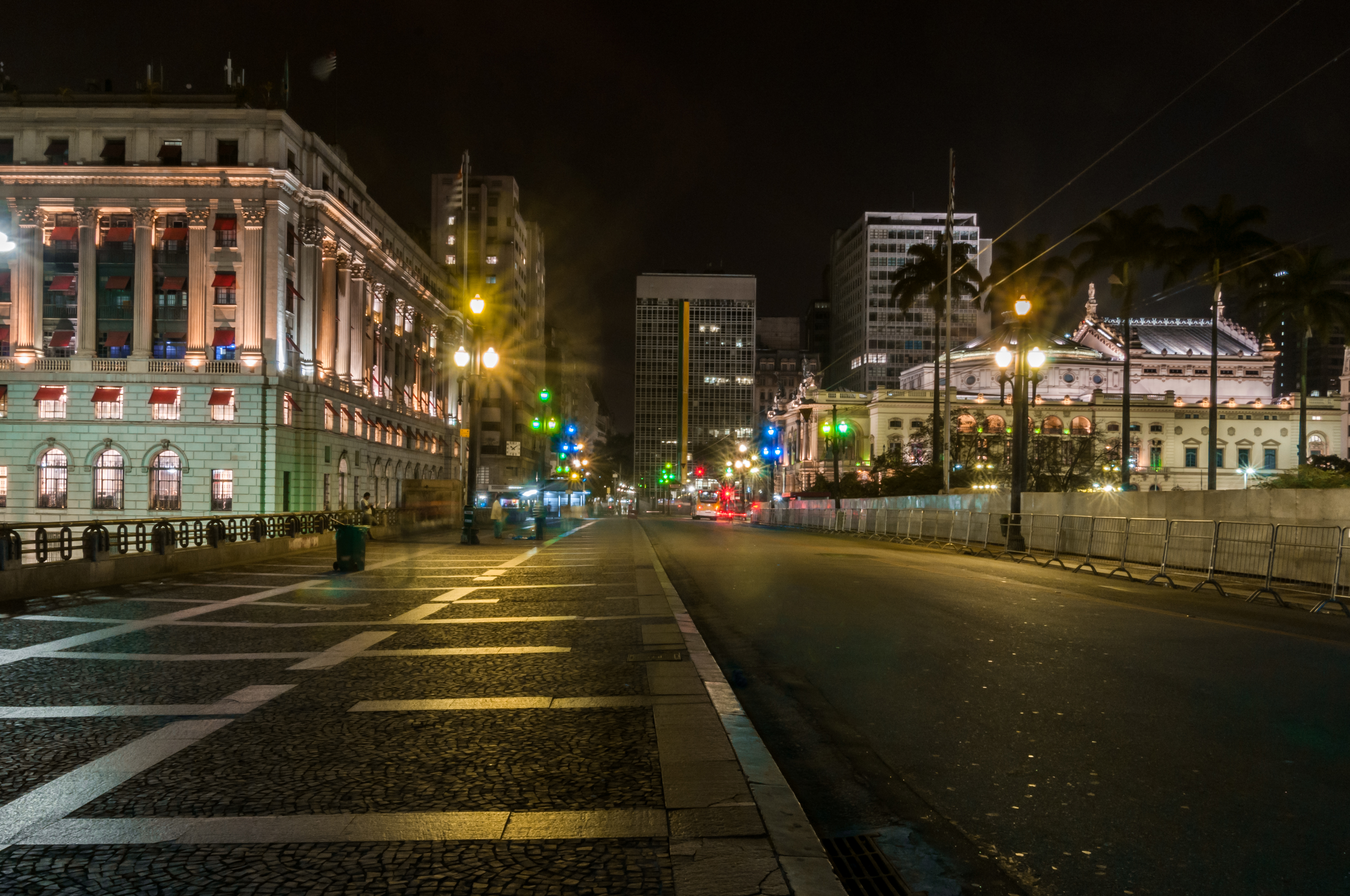 Distribuidor de Cha